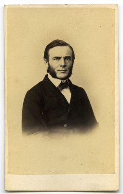 Adolph Wachsmuth